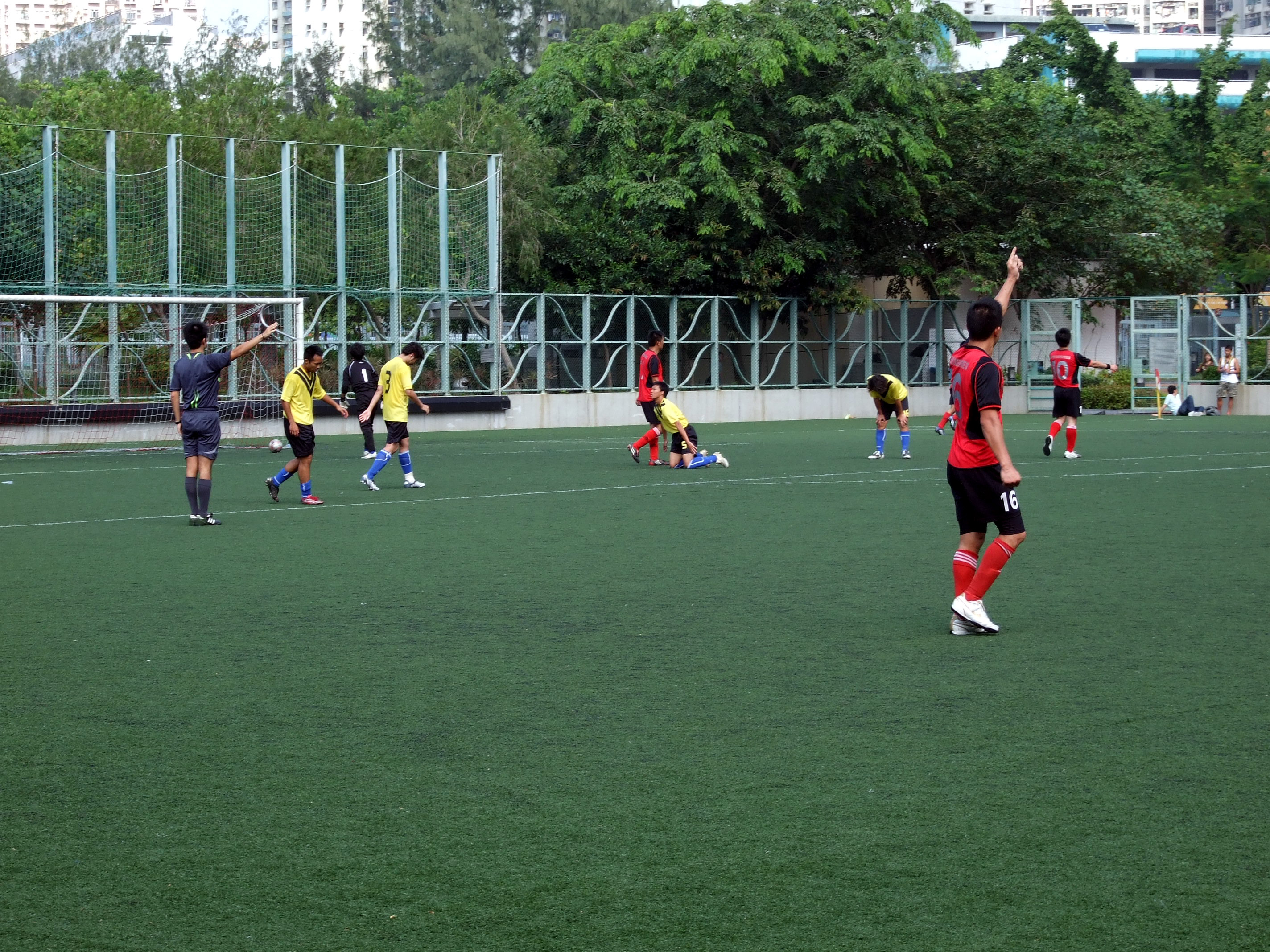 中文（香港）: 香港丙組(甲)聯賽瑞聯對消防